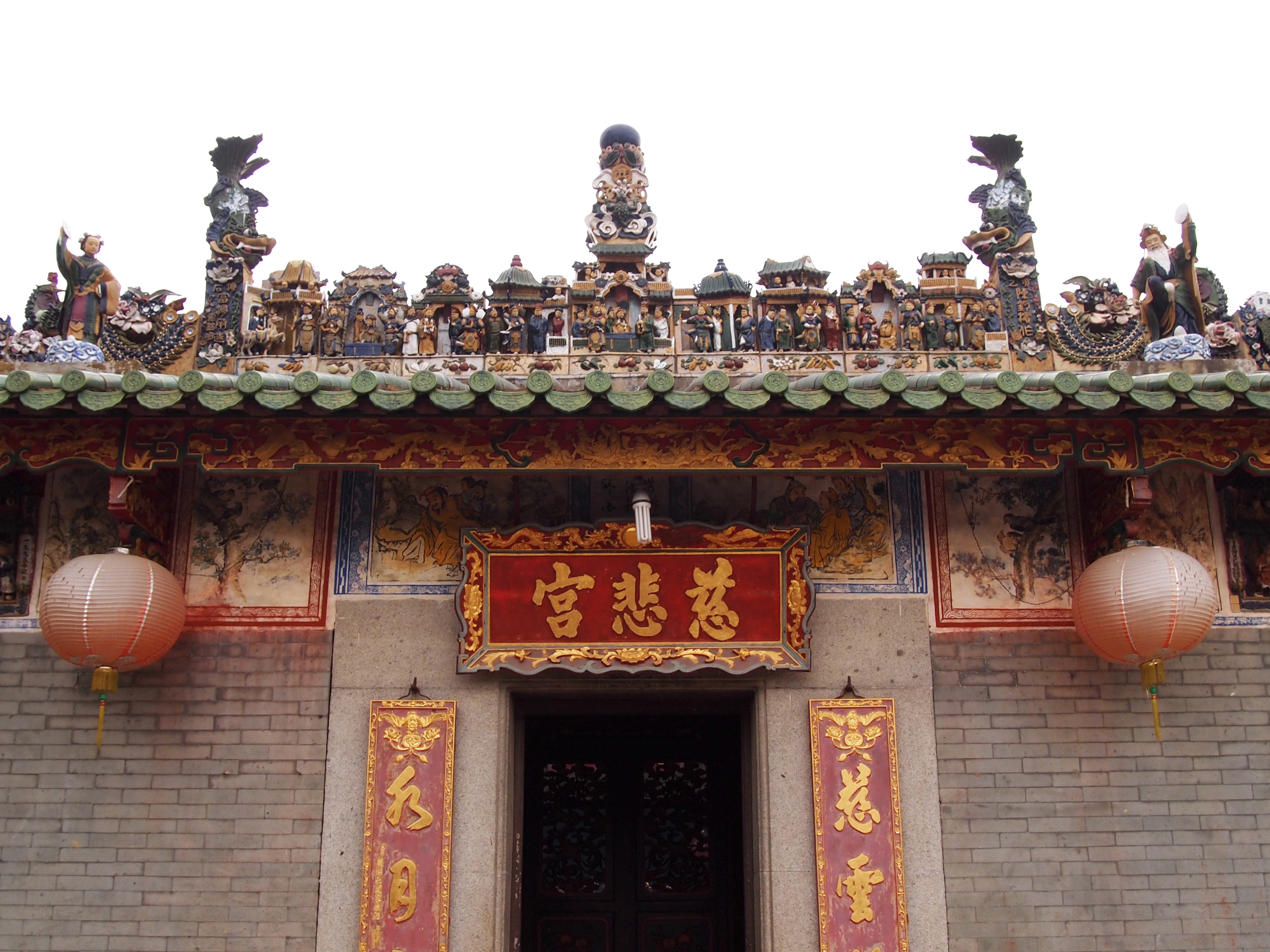 南海九江慈悲宮脊飾